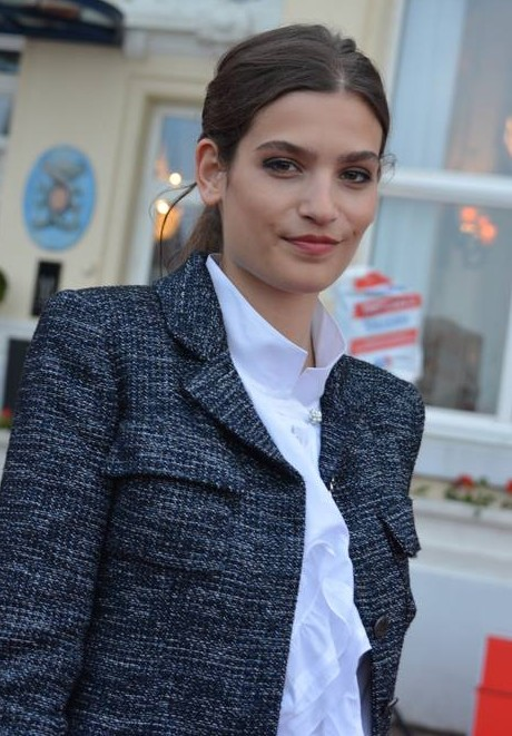 Alma Jodorowsky au festival du film de Cabourg